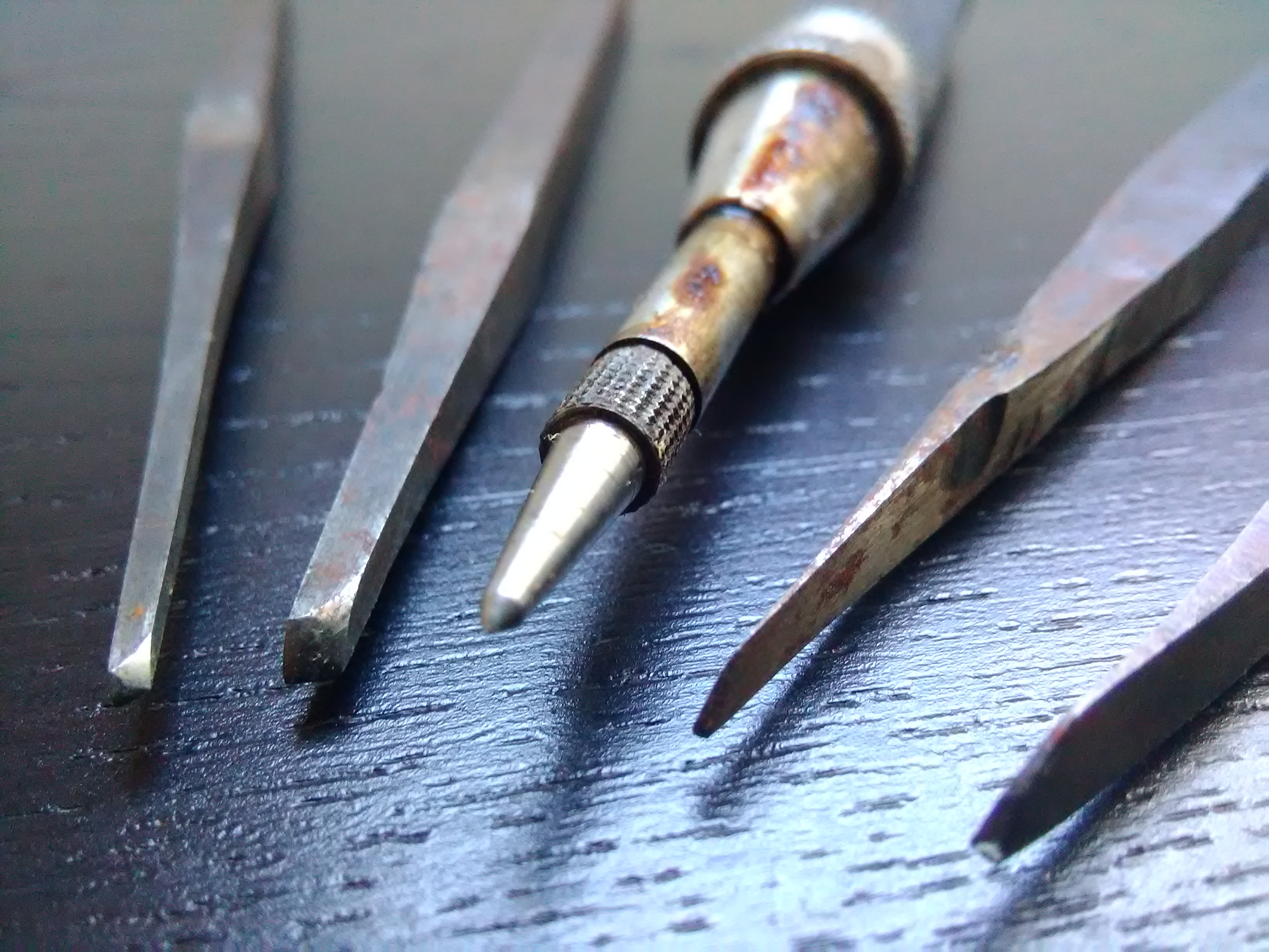 Armando Gorosabel Amuategi grabatzaile eibartarraren labain, puntzoi eta gubilen punten detailea.